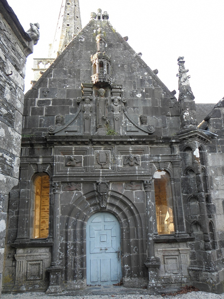 Façade méridionale de l'ossuaire d'attache de l'église Saint-Salomon de La Martyre (29).